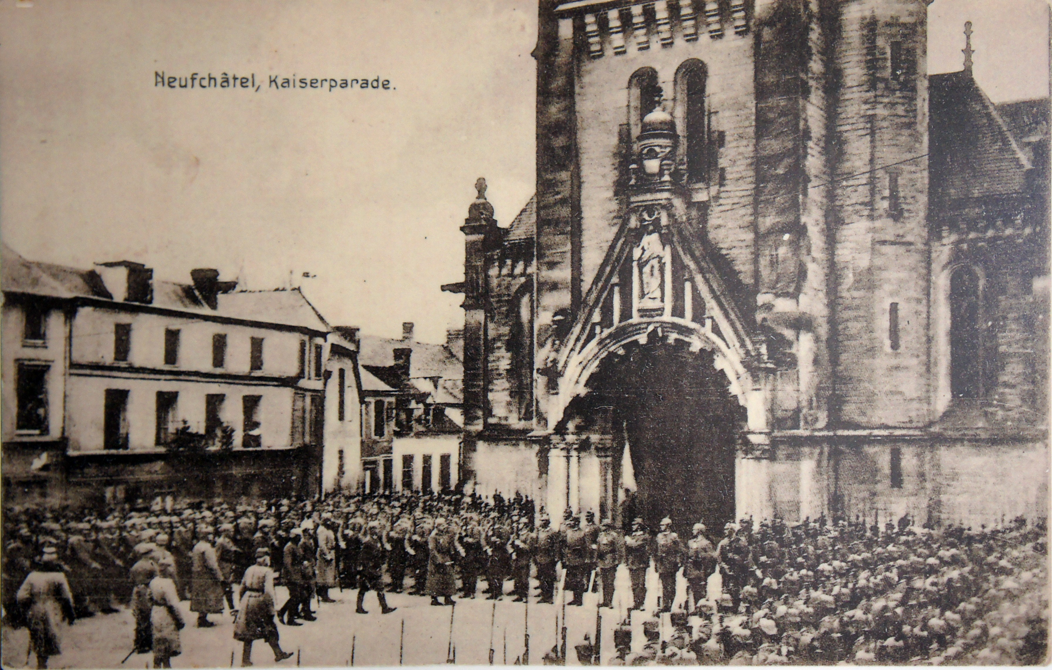 église de Neufchatel lors de la visite de Guillaume .